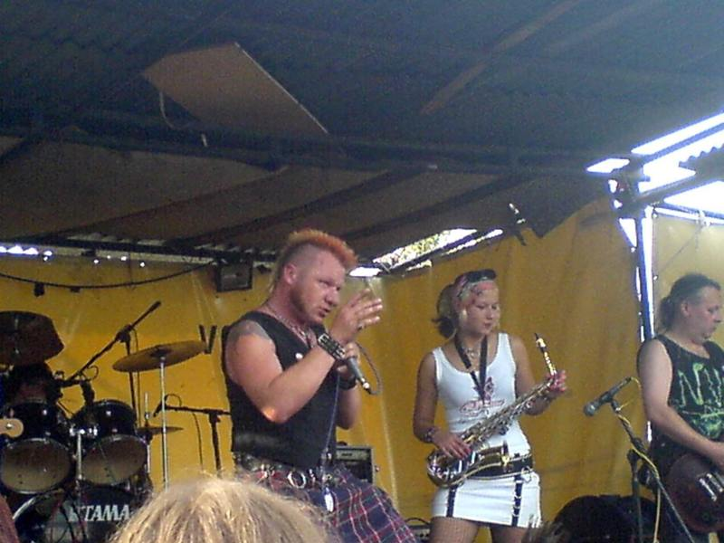 foto z konceru N.V.Ú.